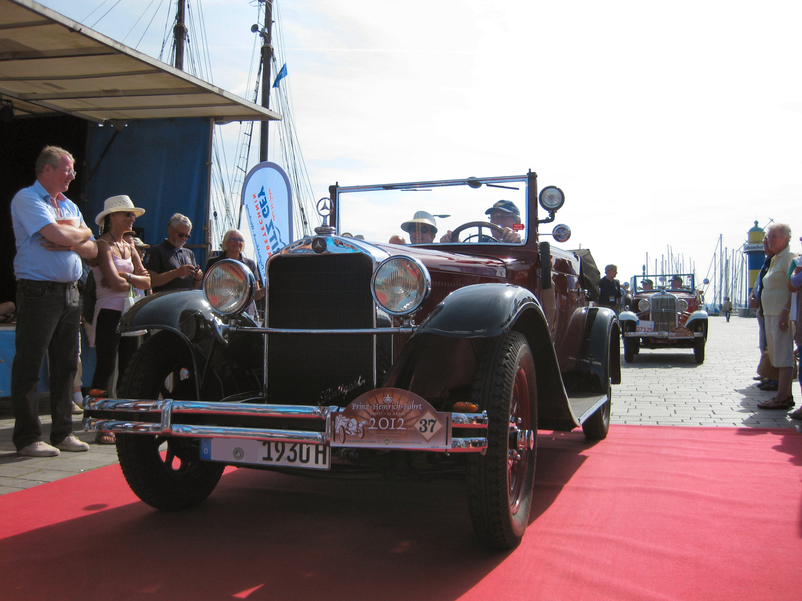 Mercedes-Benz 10/50 'Stuttgart' Cabrio (1930)